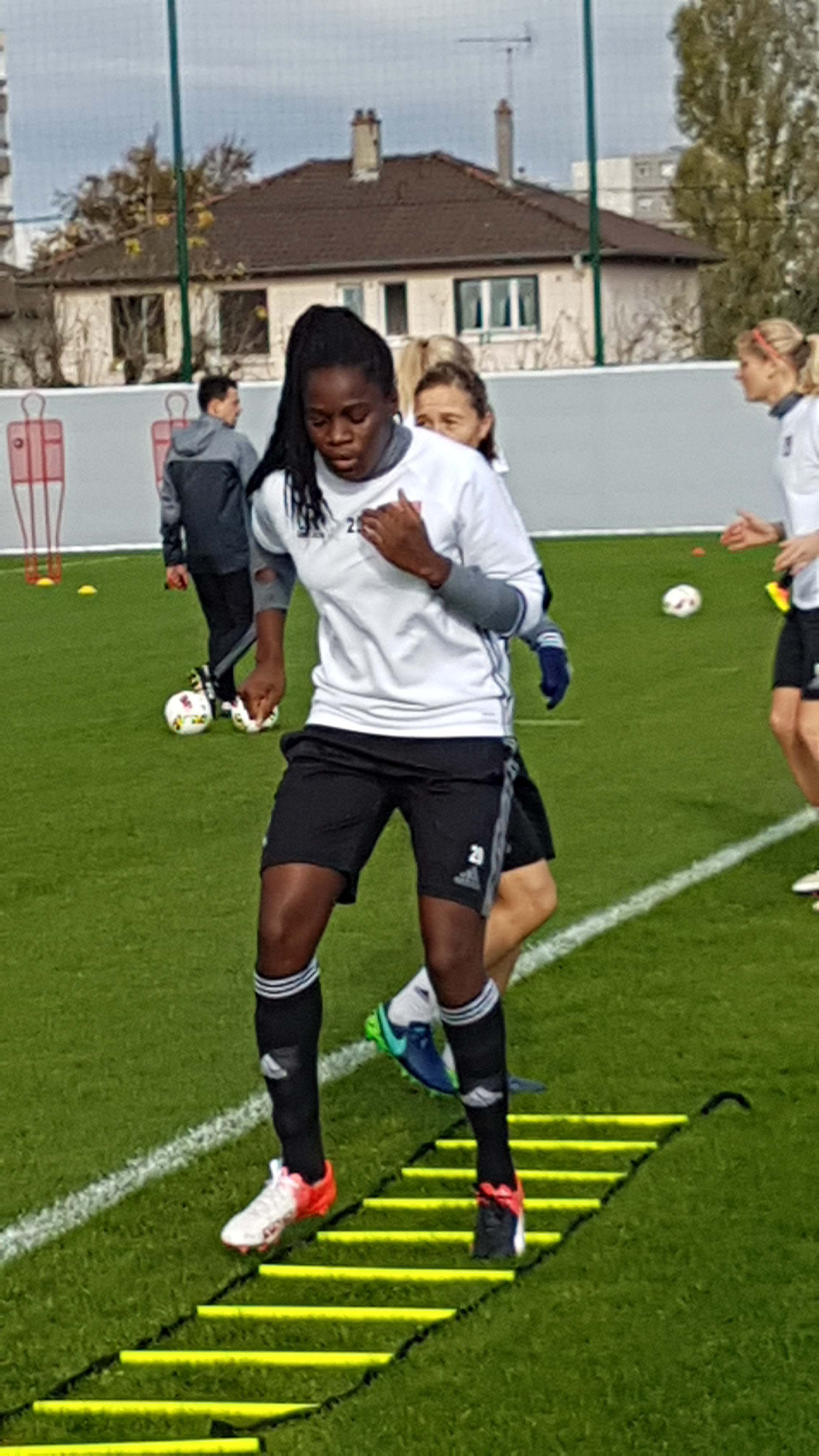 Griedge Mbock à l'entraînement avec l'Olympique lyonnais en 2016.